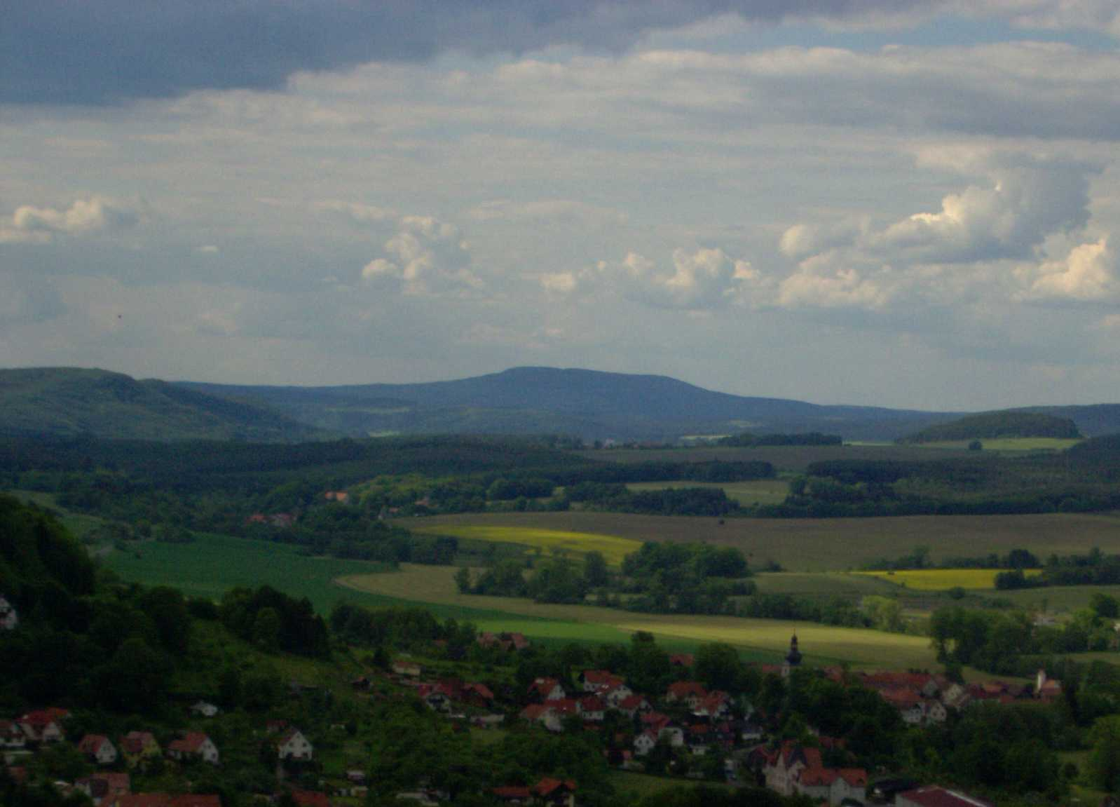 Der Dolmar (740m) bei Meiningen vom Hildburghausener Stadtberg aus; Thüringen, Deutschland